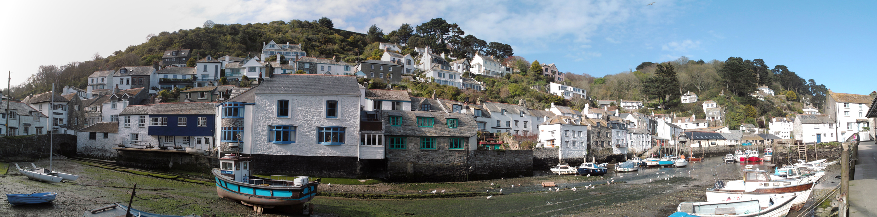 Hafen von Polperro in Cornwall, UK